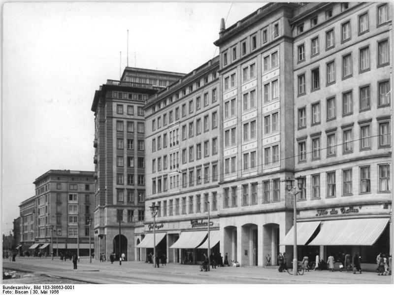 Zentralbild-Biscan We-Ho. 30.5.1956 Das neue Magdeburg Die nördliche Hälfte der Wilhelm-Pieck-Allee in Magdeburg ist jetzt fertiggestellt worden und ist mit ihren grossen Wohnhäusern und den modernen Spezialgeschäften das neue Zentrum der Elbestadt. UBz, Blick auf den Mittelabschnitt der Wilhelm-Pieck-Allee.